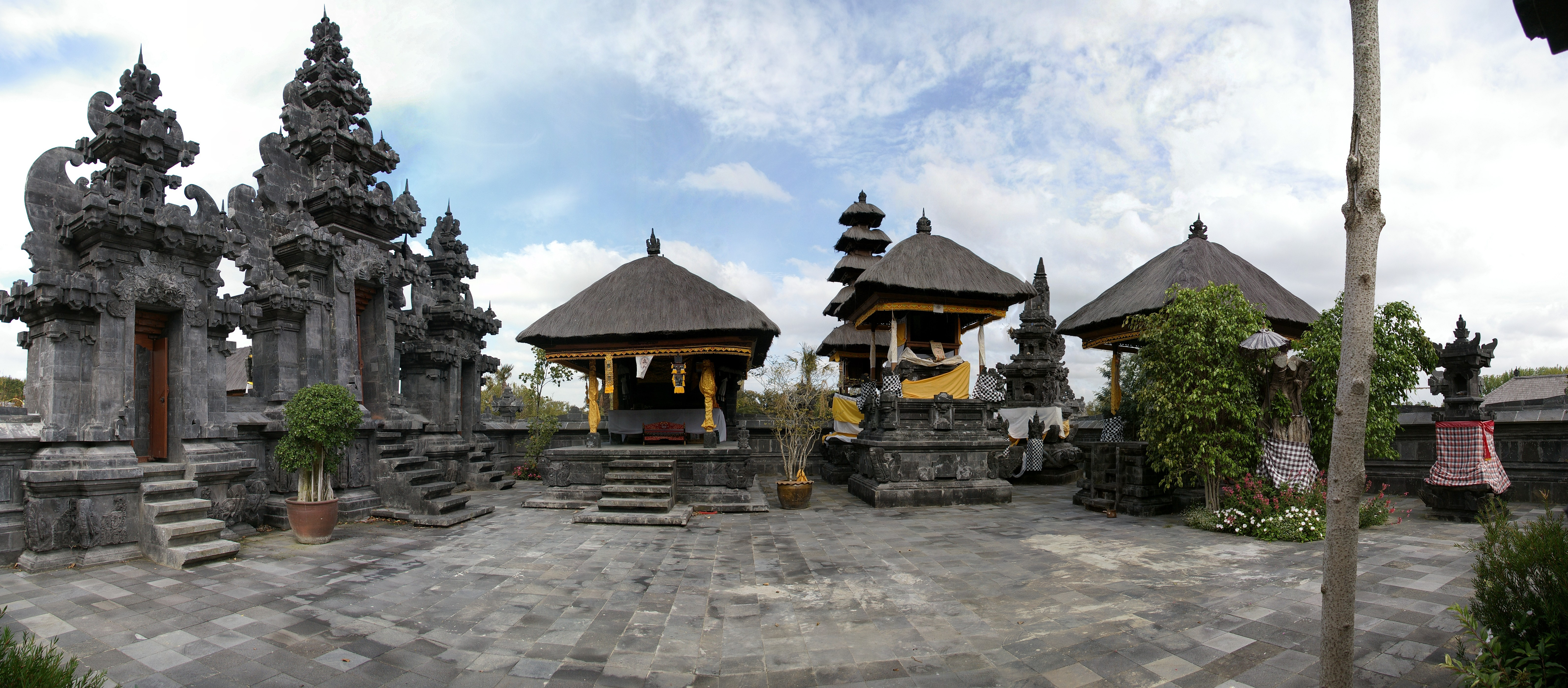 Temple Pura Agung Santi Bhuwana, Temple indonesien - Pairi Daiza